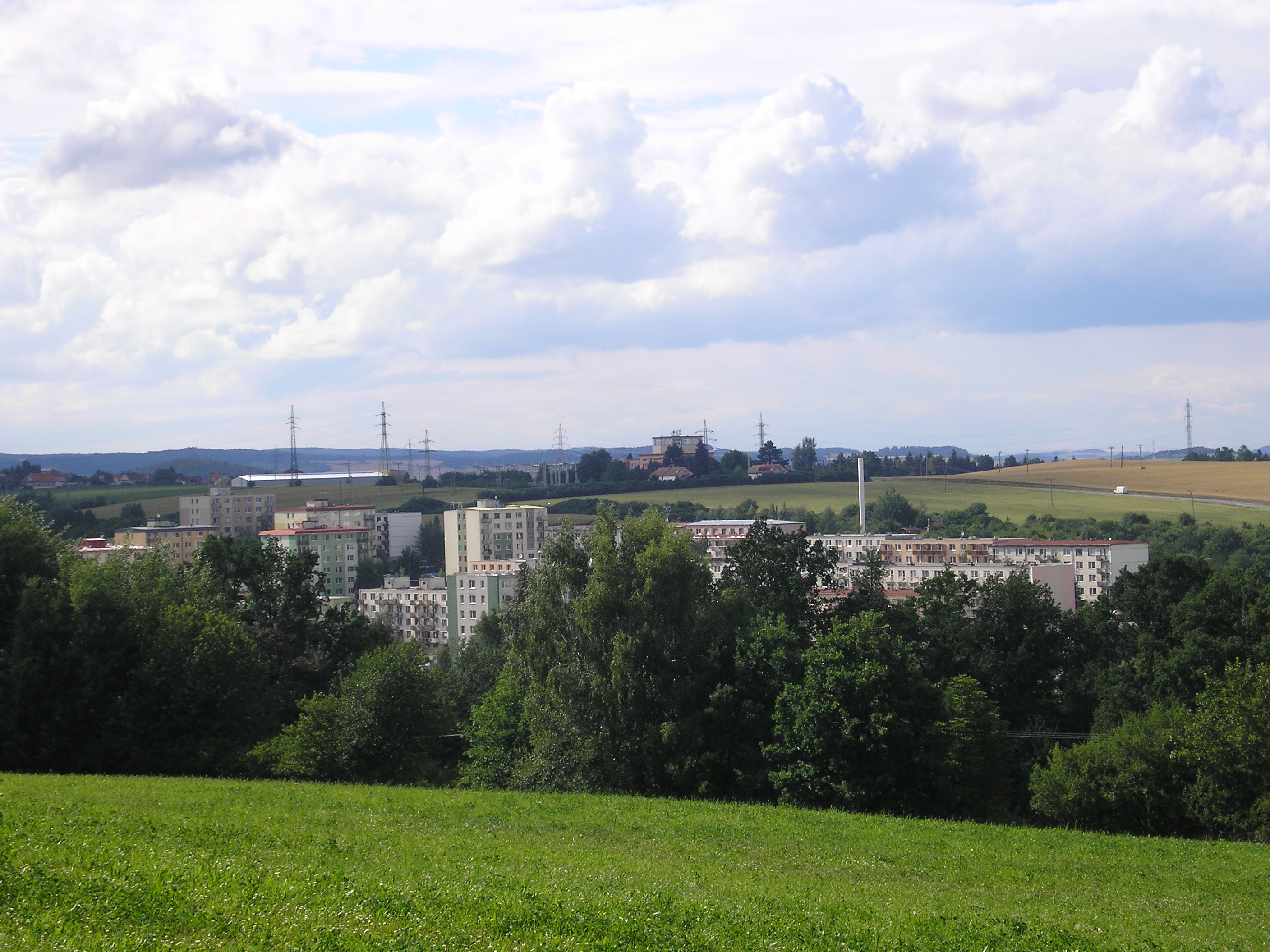 Třebič Borovina - all view